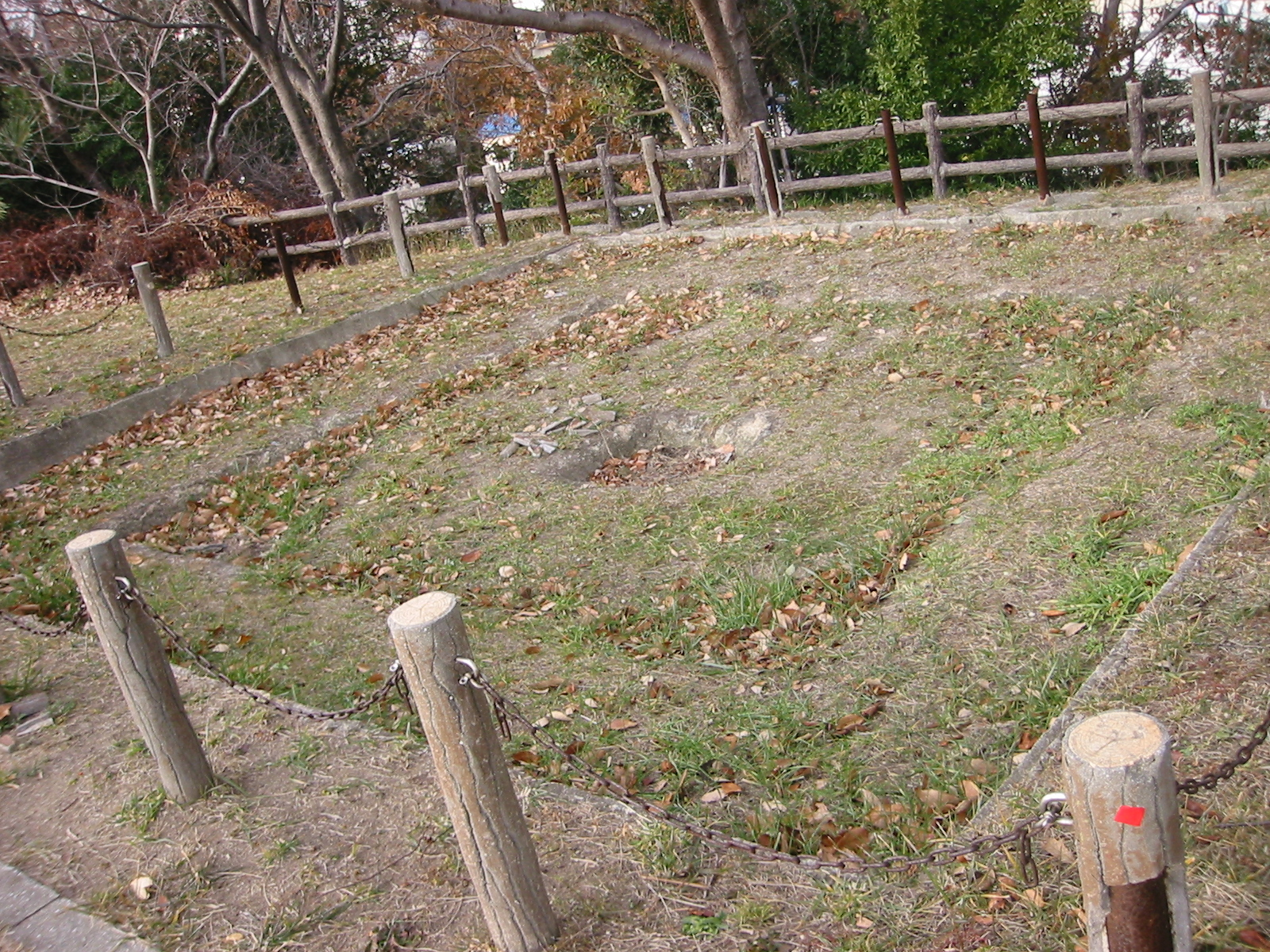 大歳山遺跡公園竪穴住居焼け跡